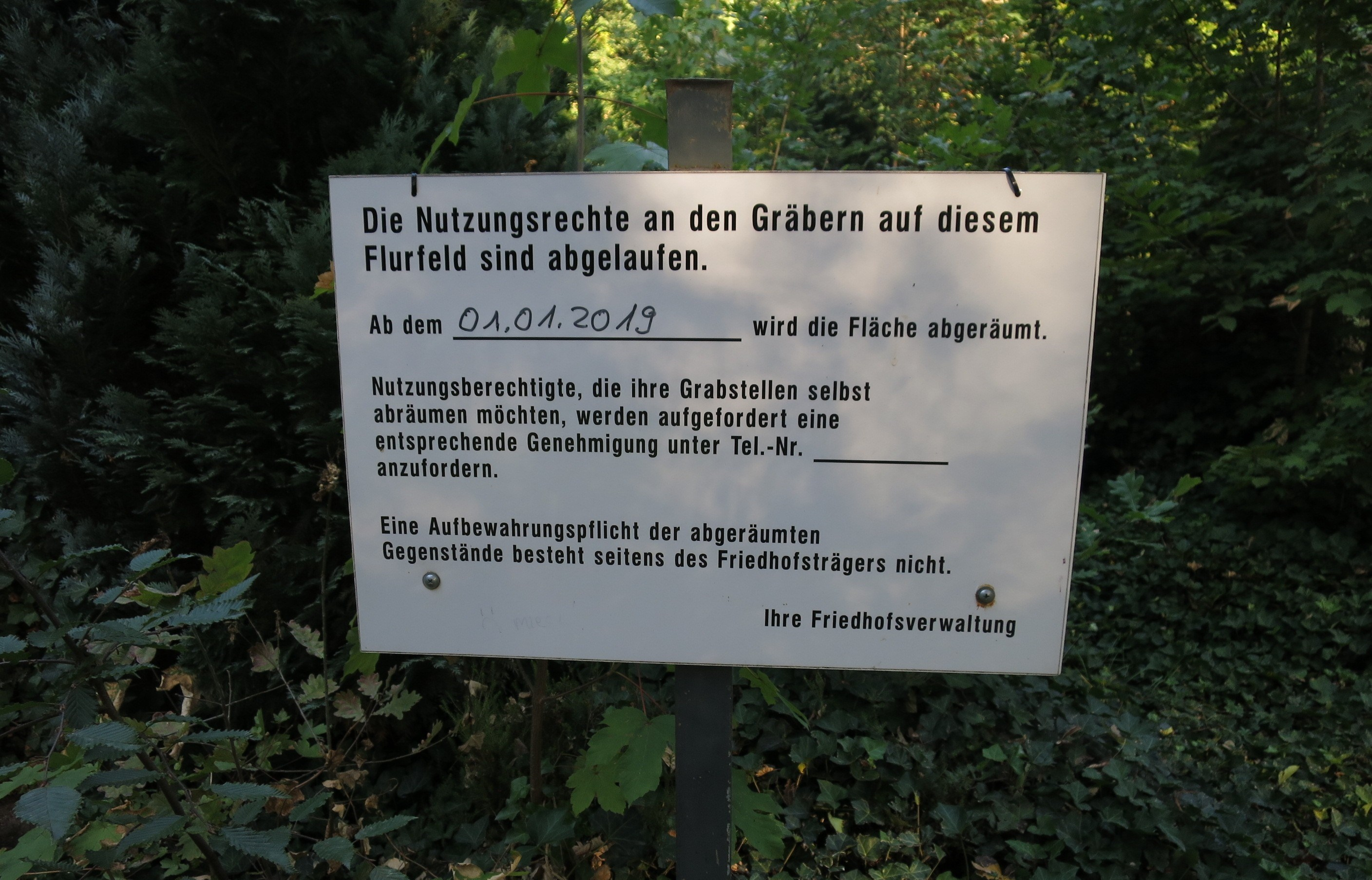 Ende der Ruhefrist - Hinweis auf Abräumung der Gräber